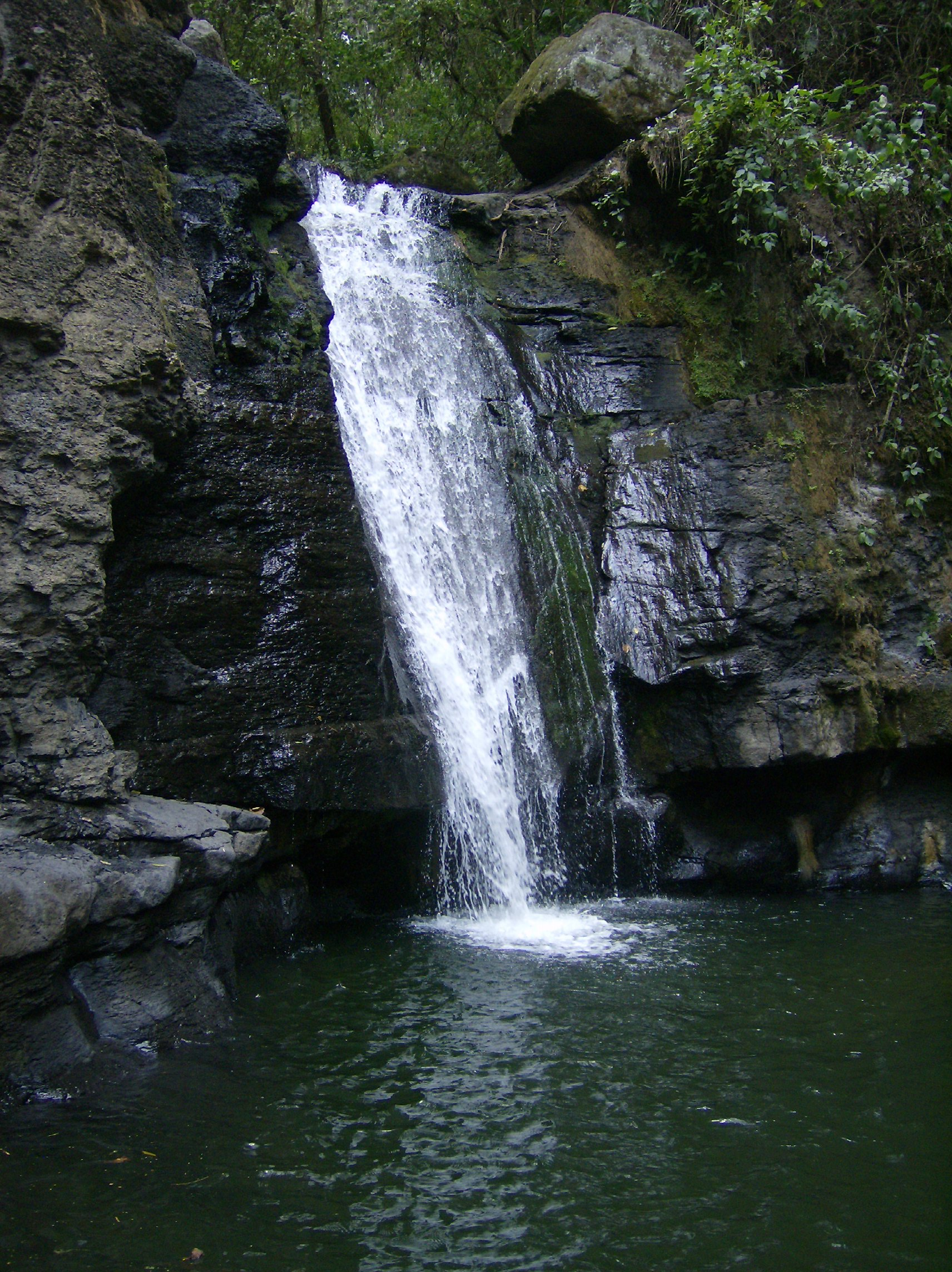 San Eduardo, Boyacá, Colombia